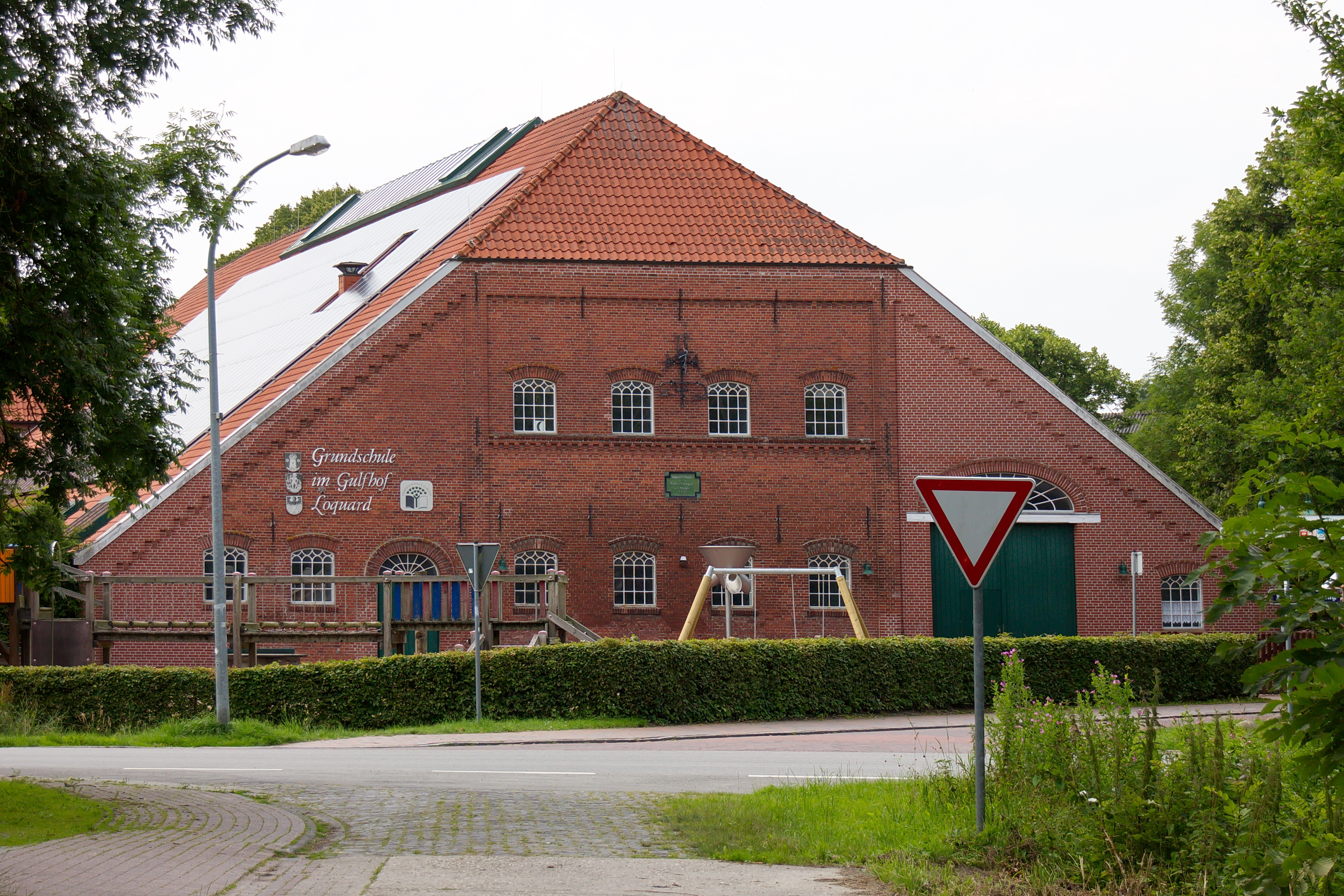 Grundschule im Gulfhof in Loquard (Krummhörn), Niedersachsen, Deutschland